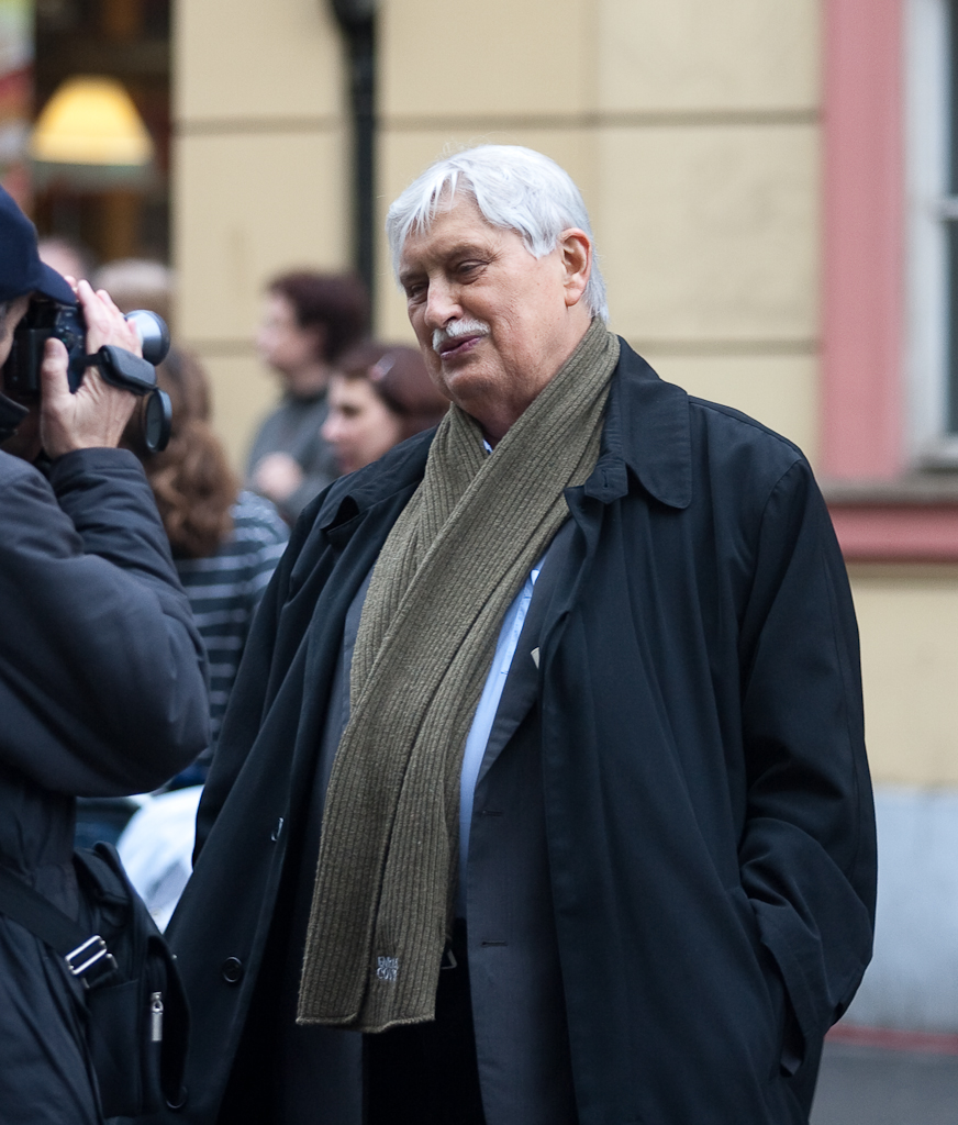 Jiří Dienstbier (1937-2011) v Praze